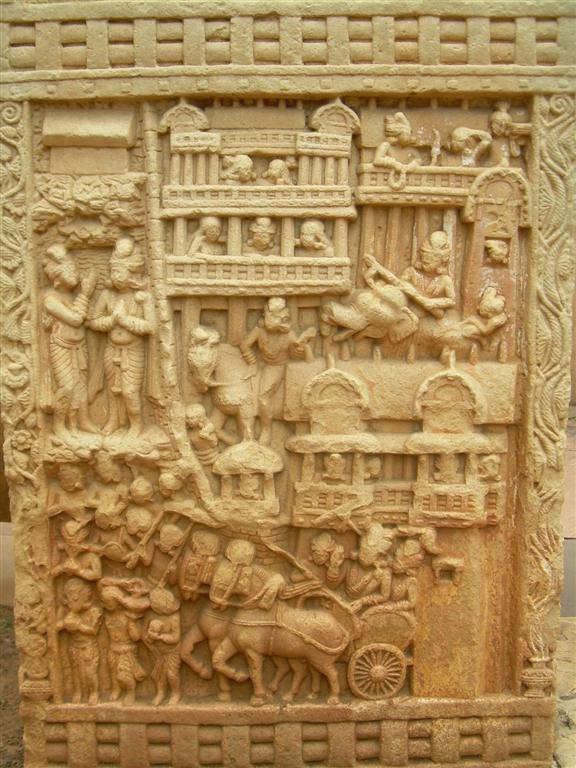 Detail on Sanchi stupa